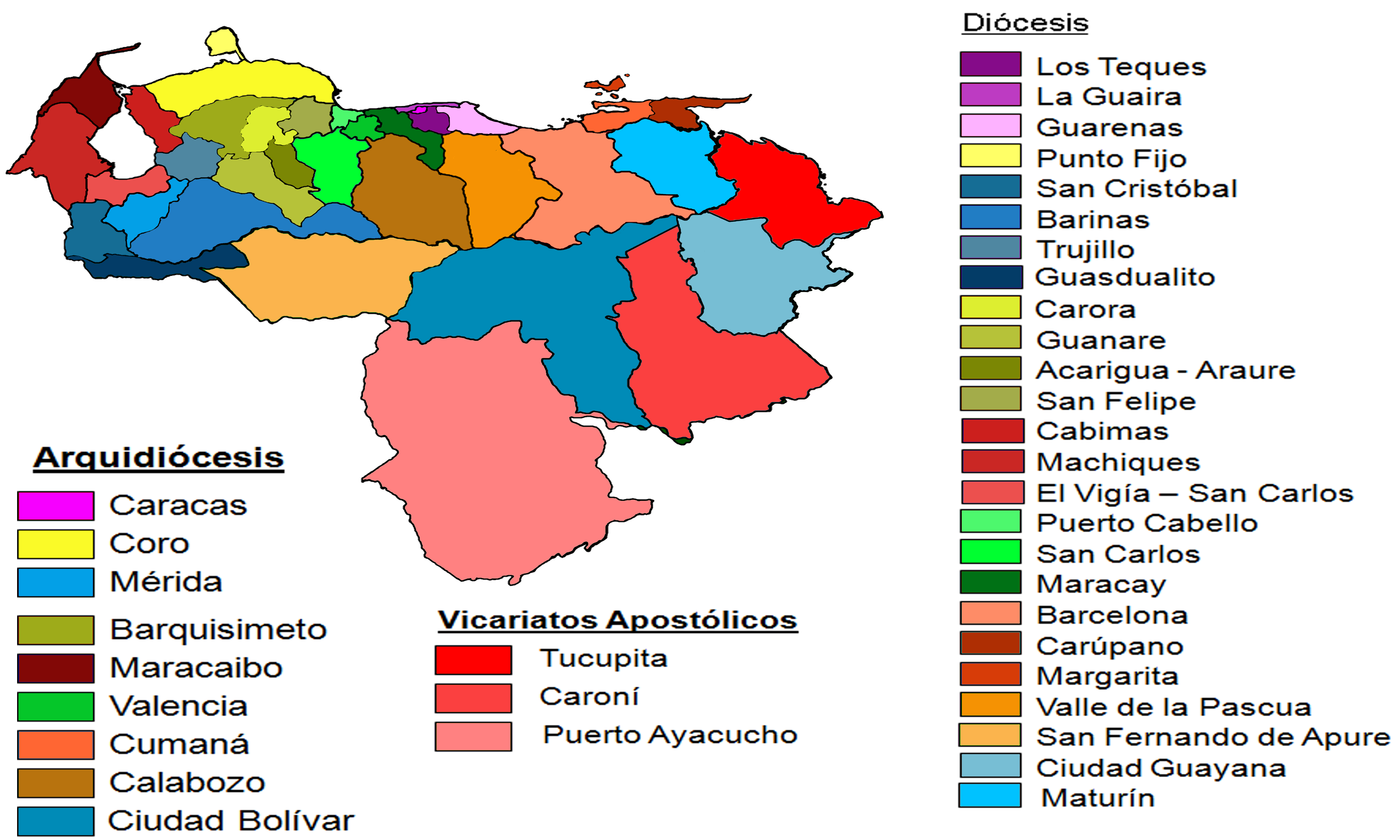 Cada Arquidiócesis y Diócesis en relación a su territorio geográfico en Venezuela